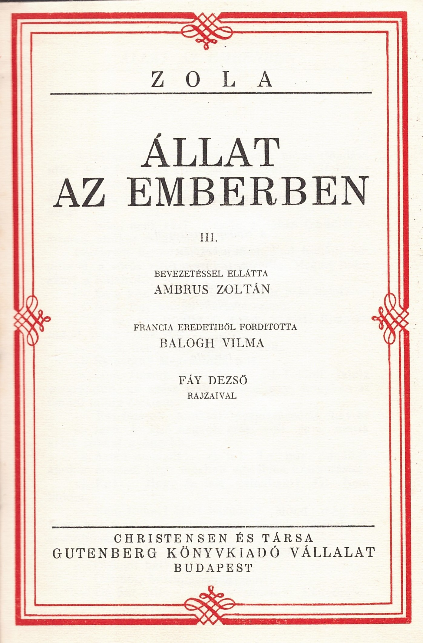 Zola műveinek díszkiadása a két világháború közötti időből